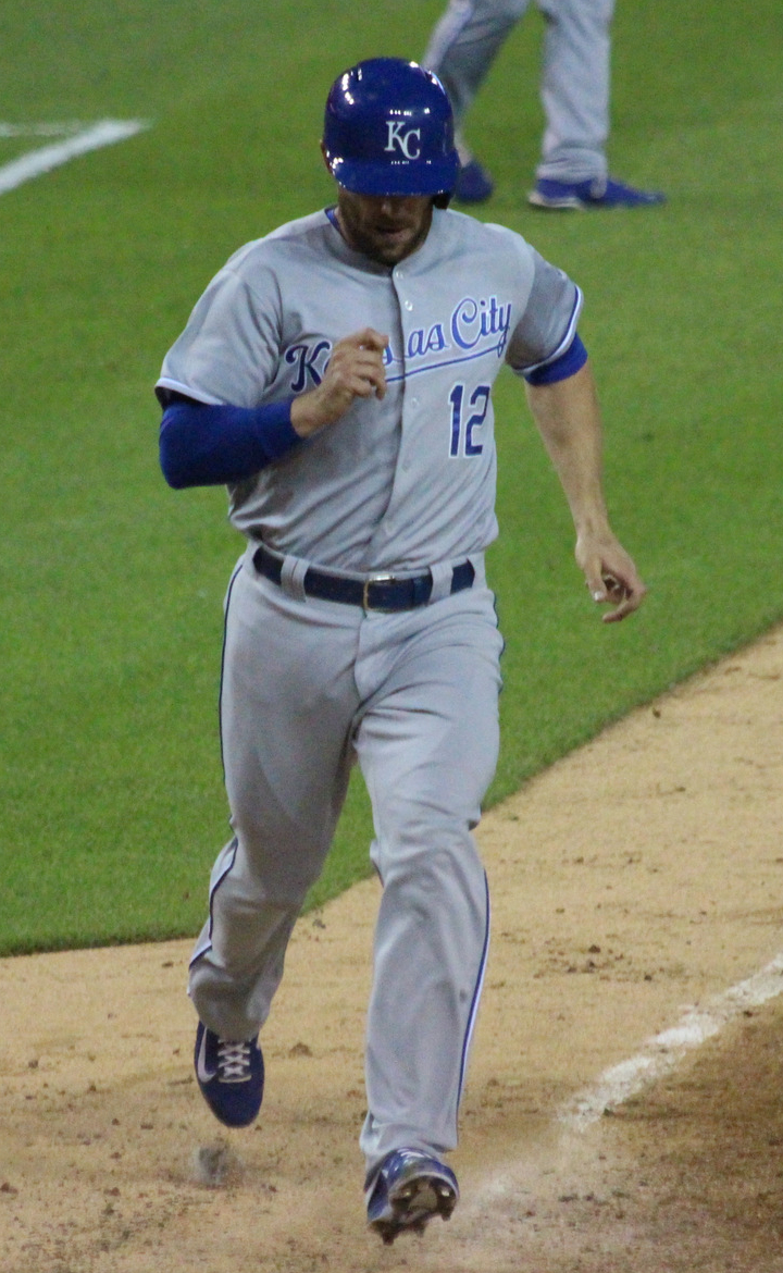 Brett Hayes